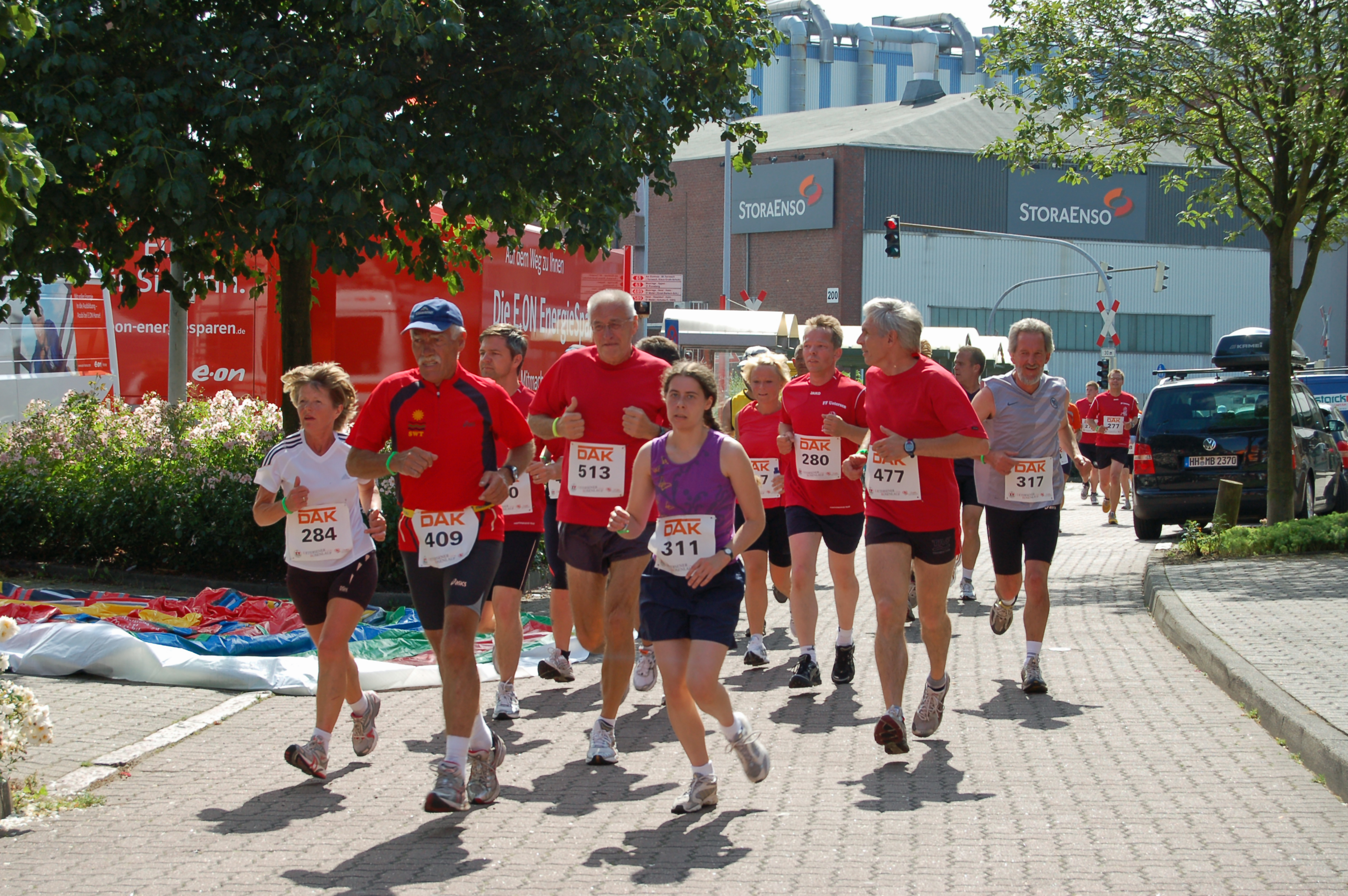 Impressionen vom Rosenlauf 2009 anläßlich der 775-Jahr-Feier von Uetersen. Der Rosenlauf war die erste Großveranstaltung dieser Art in Uetersen.